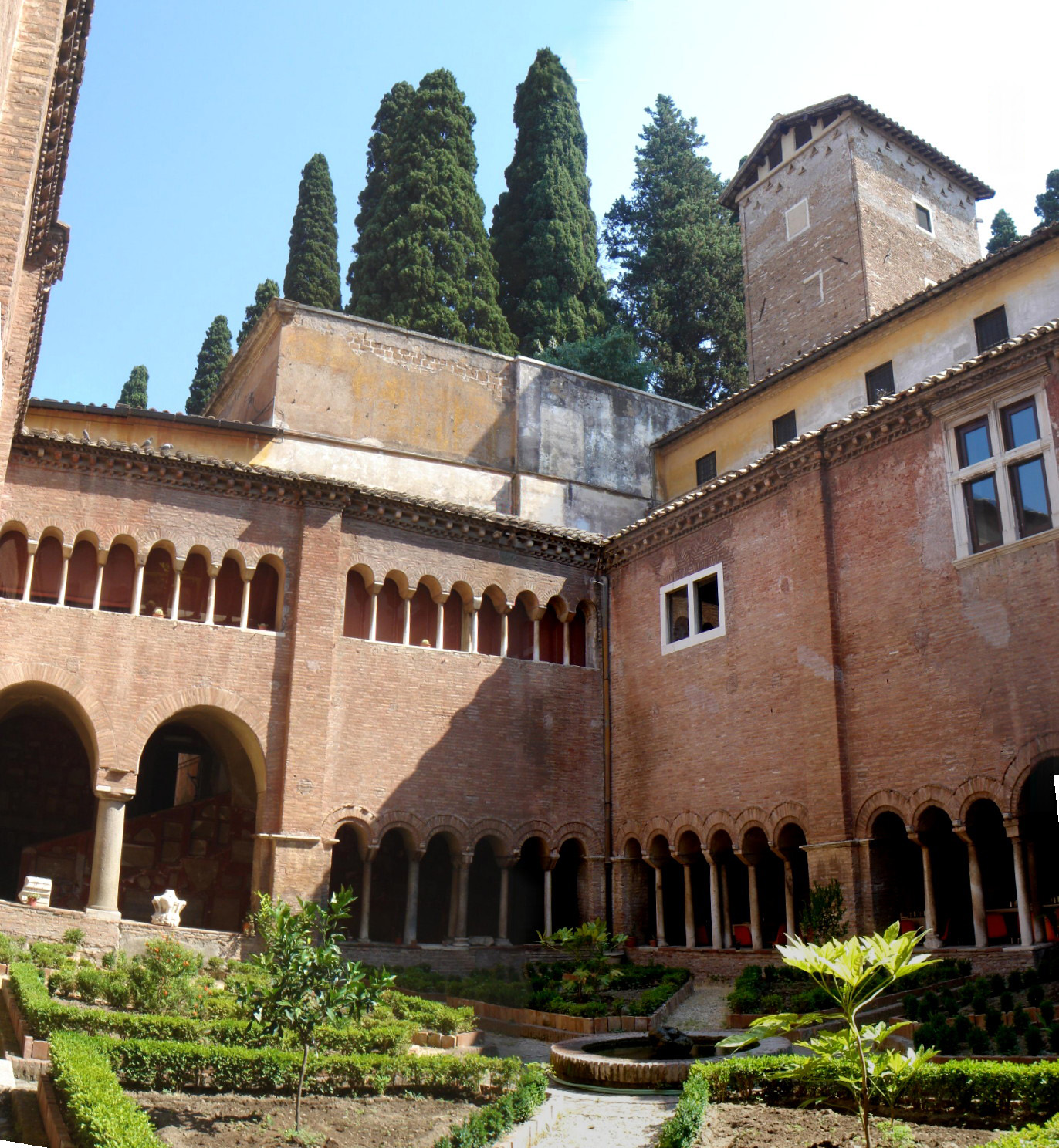 Roma , san Lorenzo fuori le mura: il giardino del chiostro